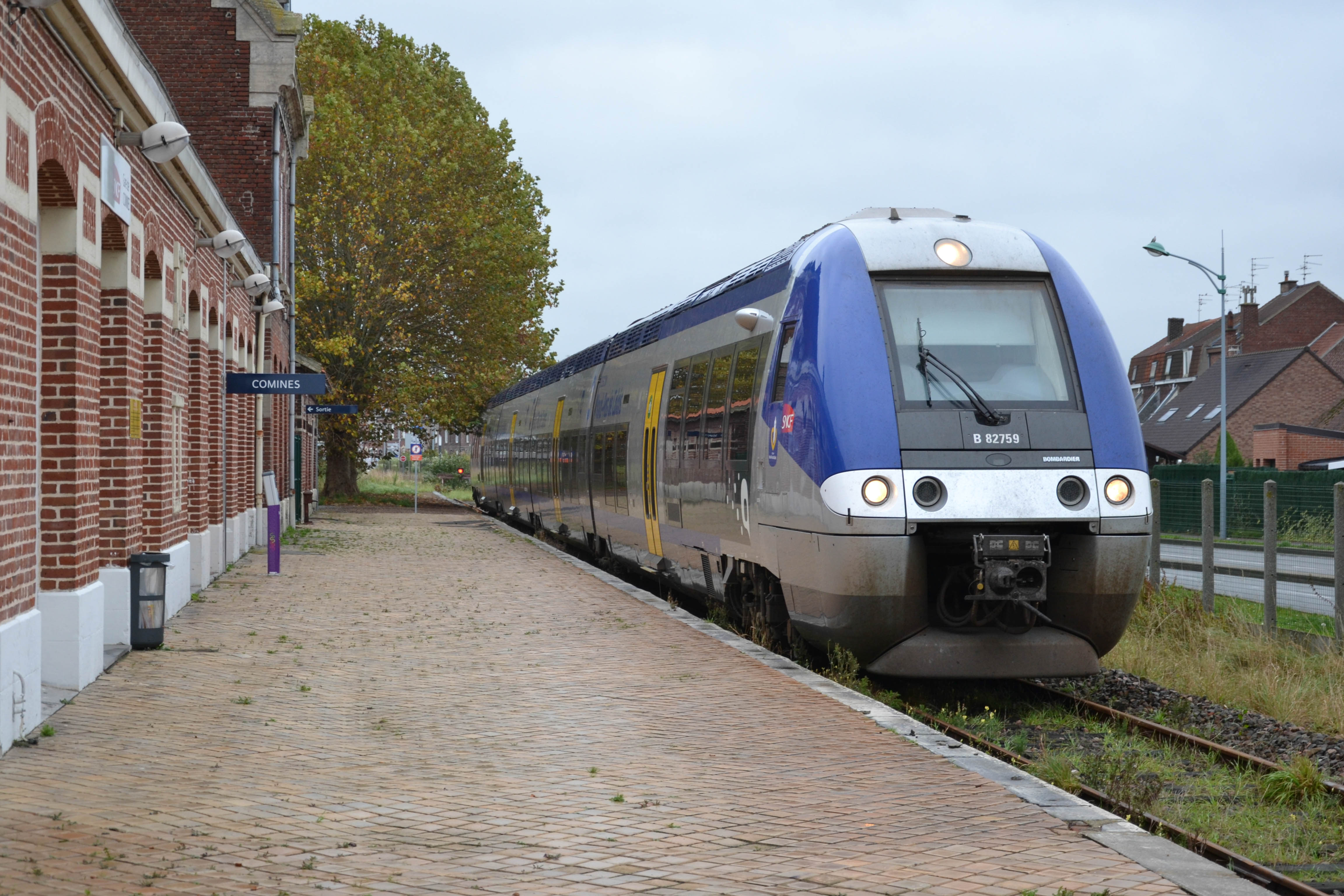 Automotor SNCF B 82759/760 en Comines (Francia).